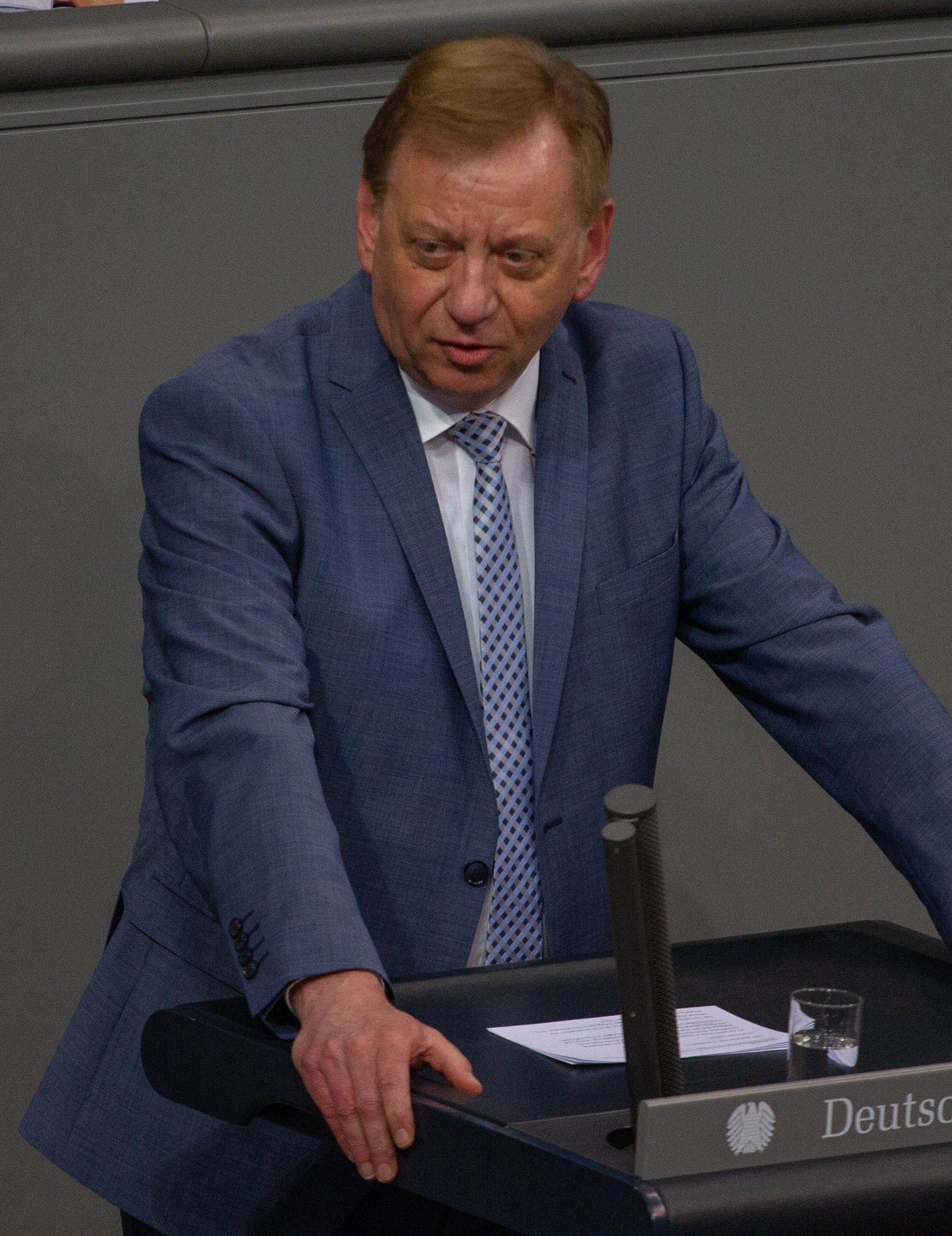 Ingo Gädechens, Mitglied des Deutschen Bundestages, während einer Plenarsitzung am 11. April 2019 in Berlin.